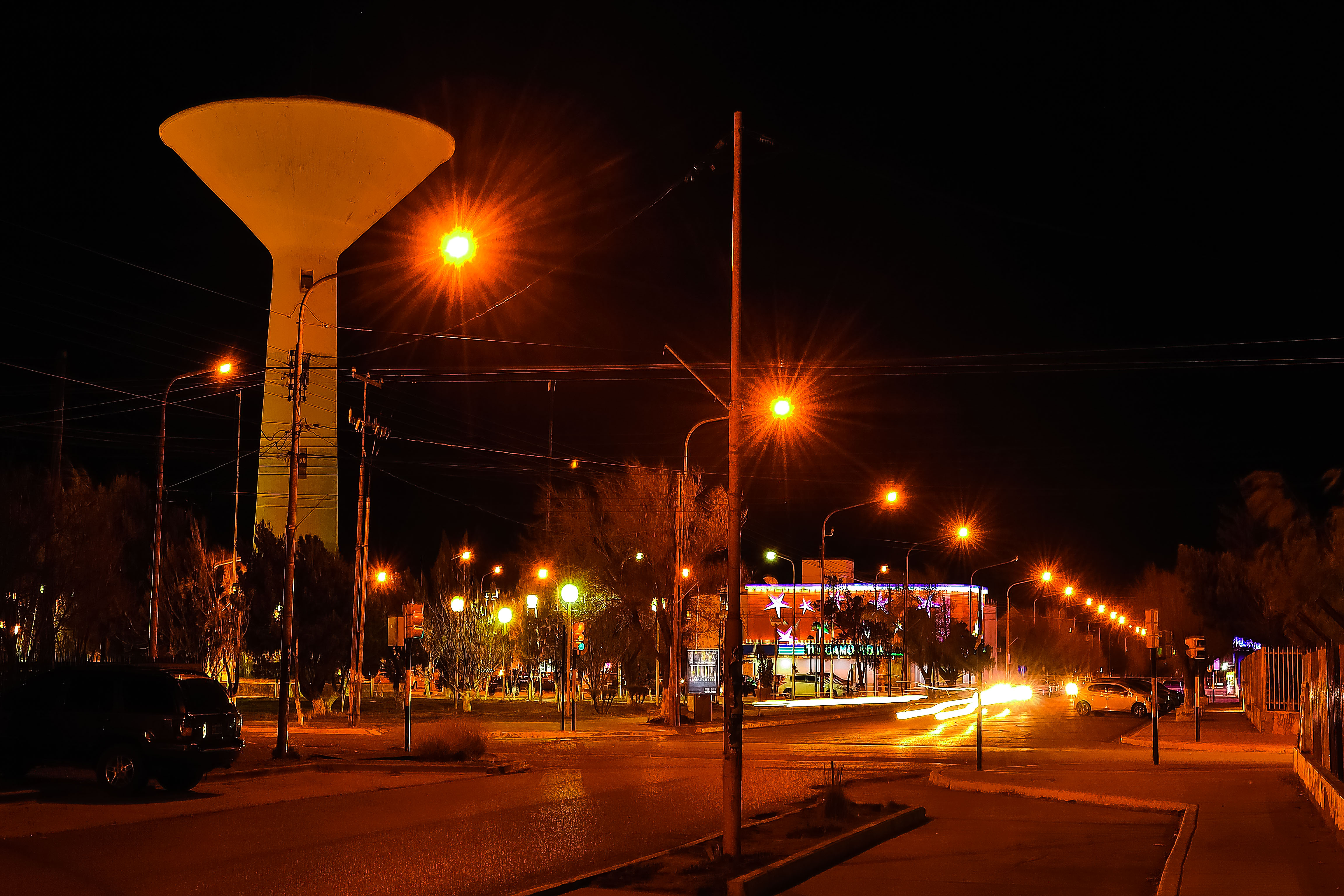 Fotografía nocturna de la Plaza General San Martín de Pico Truncado